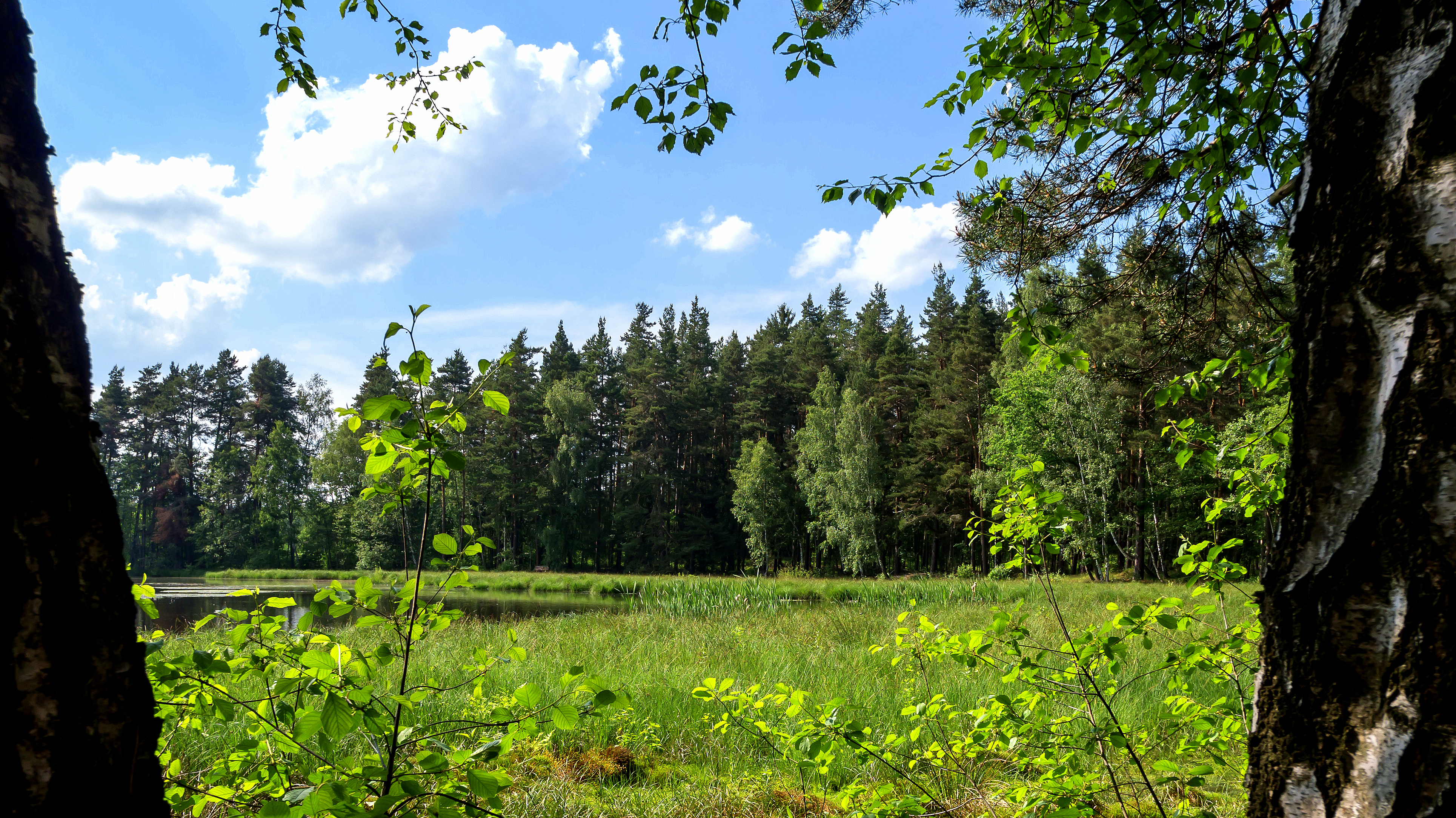 Verlandungszone des Galgenteichs in Pennewitz, gelegen im Naturschutzgebiet „Pennewitzer Teiche–Unteres Wohlrosetal“ und im gleichnamigen FFH-Gebiet